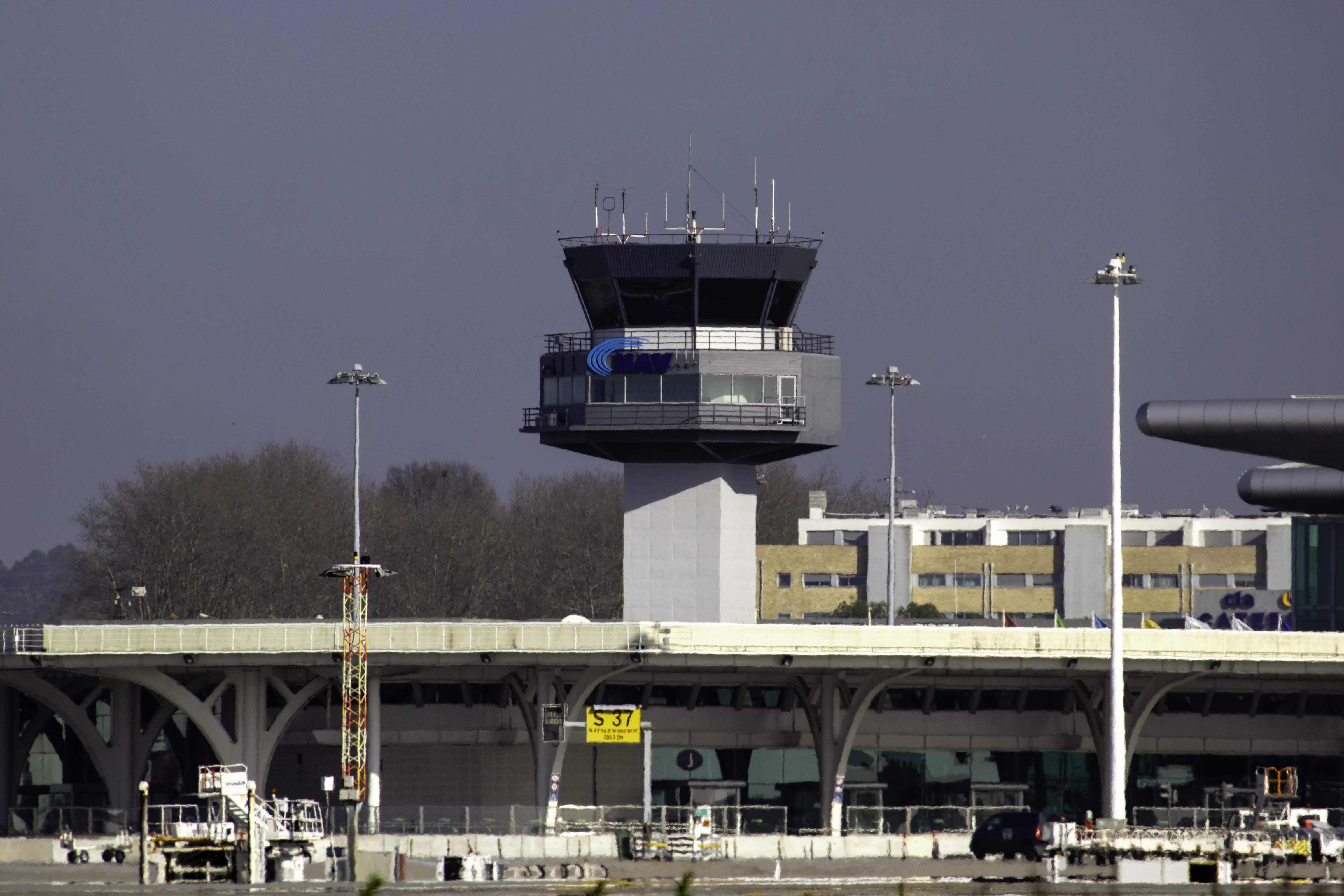 Torre de control do aeroporto do Porto.